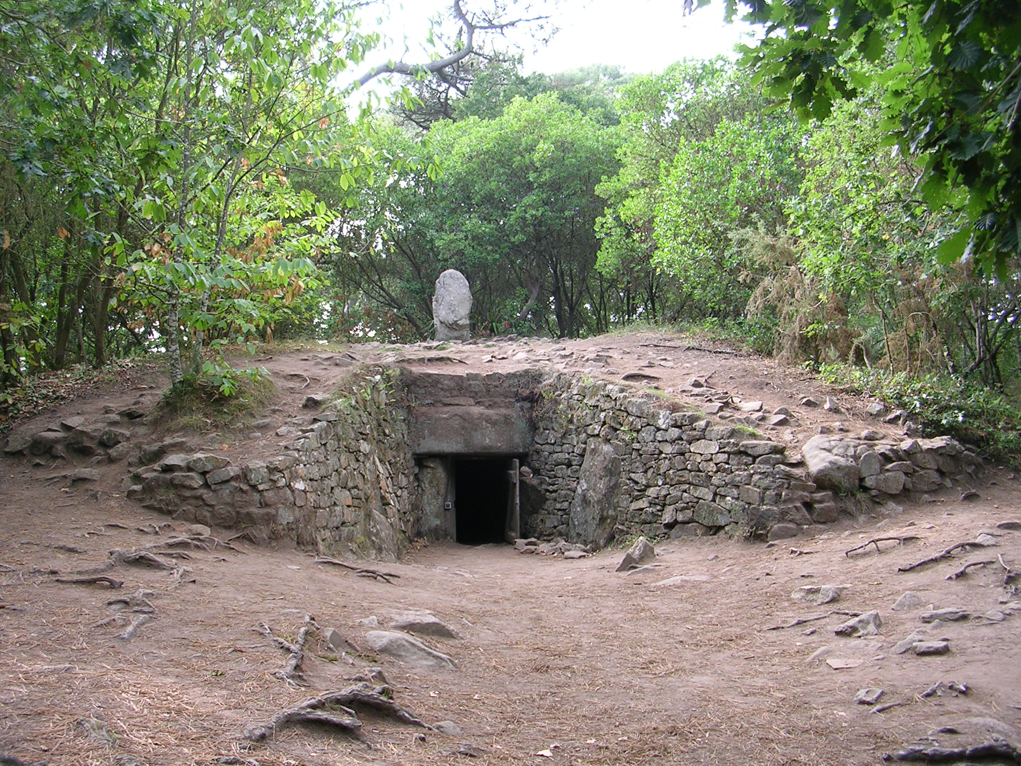 Tumulus de Kercado .